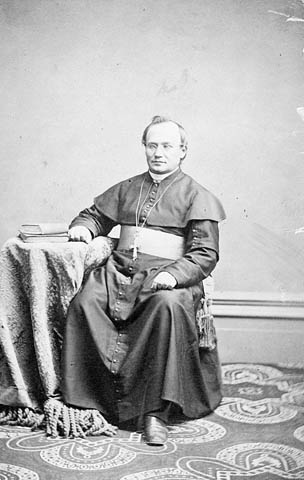 Photo de Mgr Taché